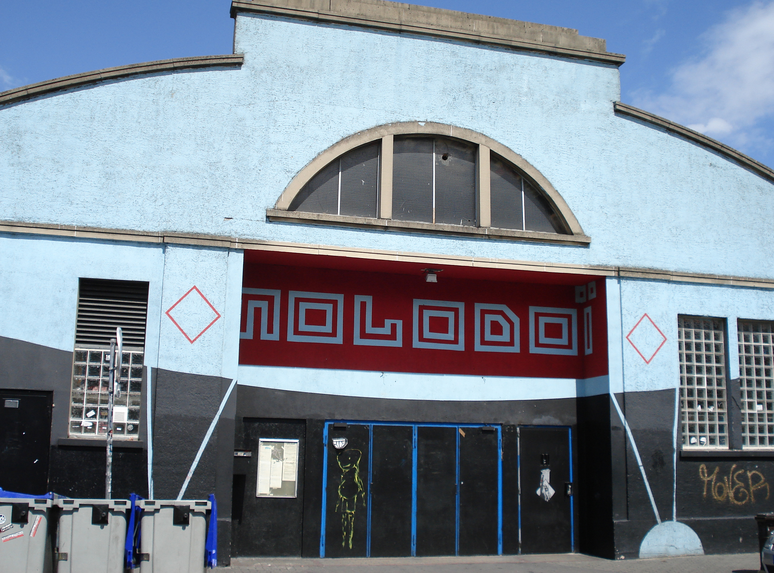 Façade de la salle du Molodoï à Strasbourg.